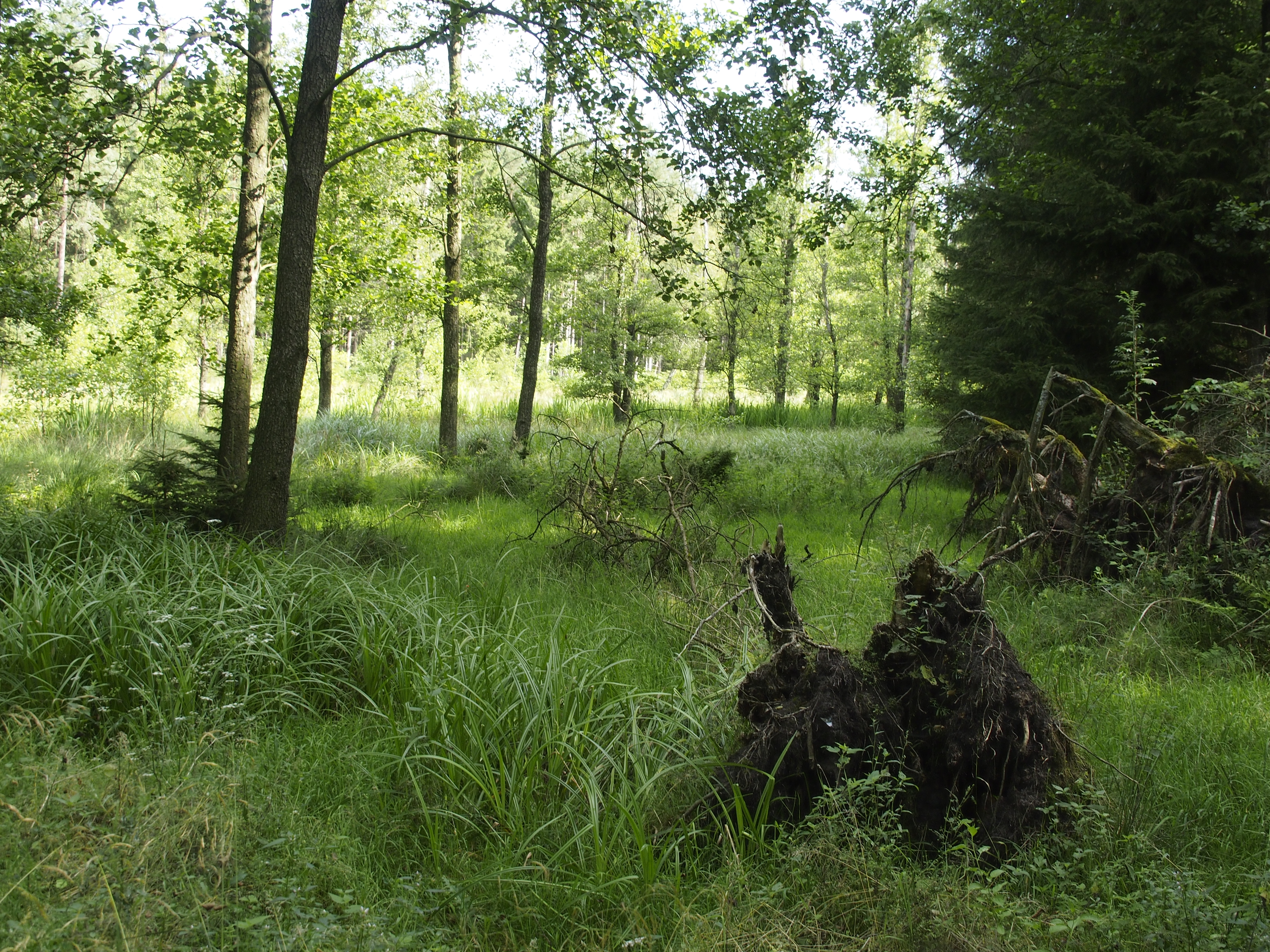 Naturschutzgebiet Tal der Lutter